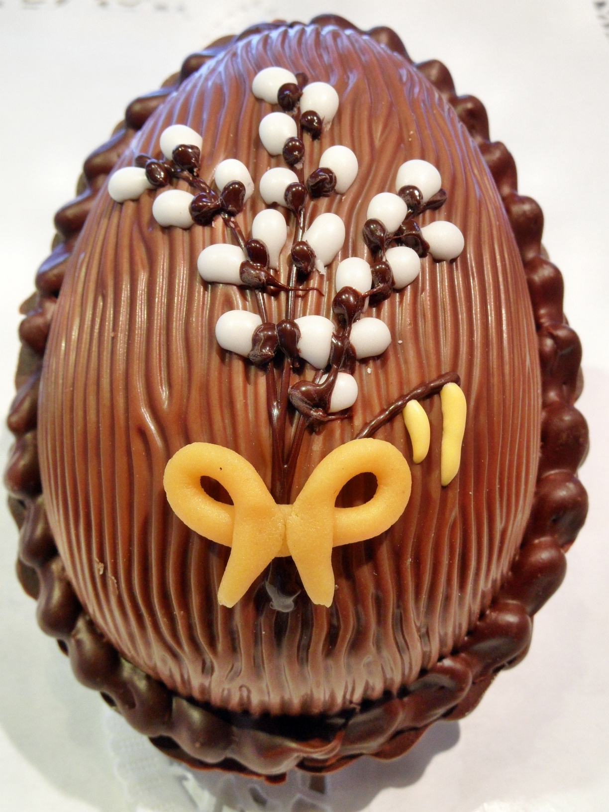 Verzierung in Form von Palmkätzchenzweigen auf unseren Ostereiern.